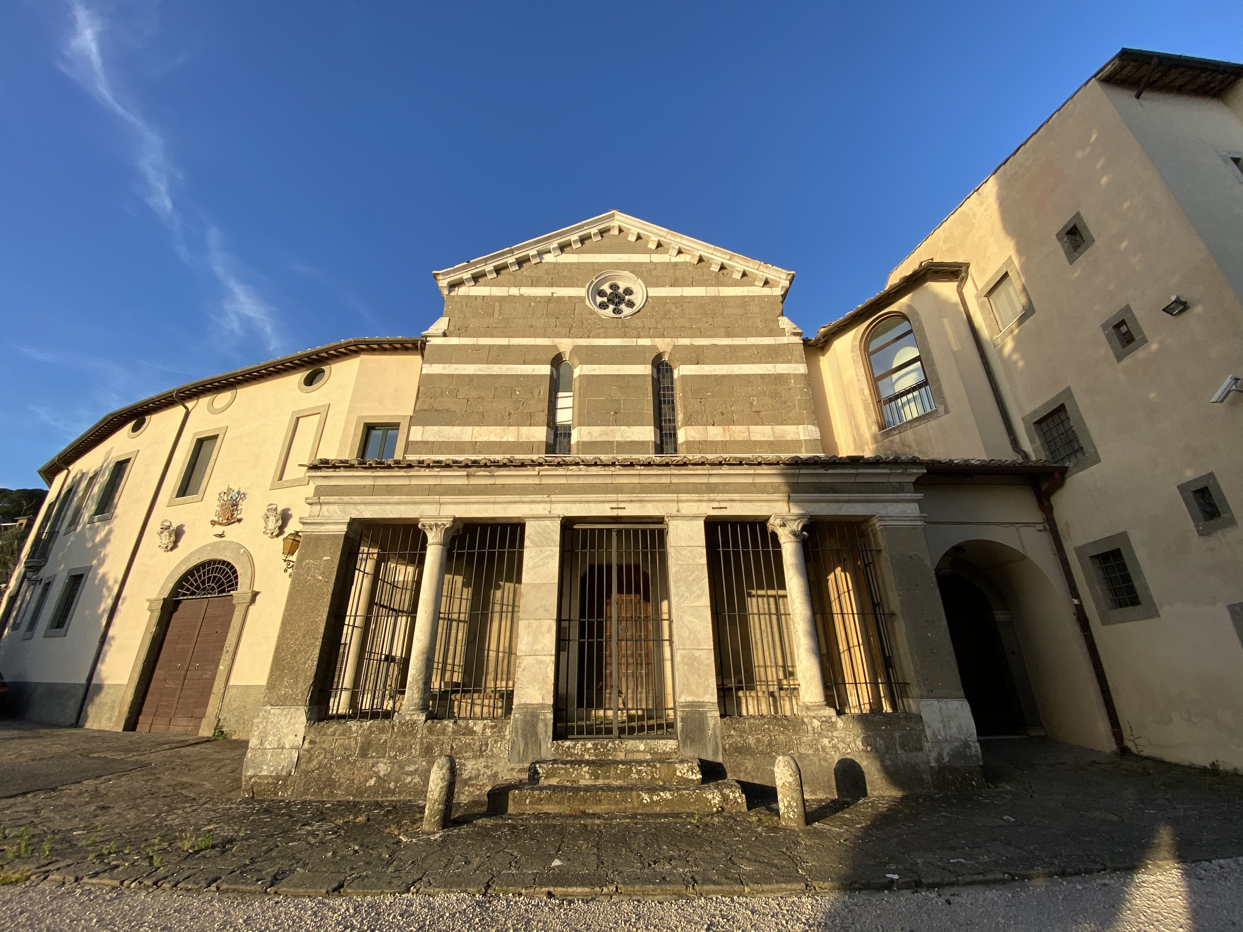 Chiesa del convento di Palazzolo a Rocca di Papa